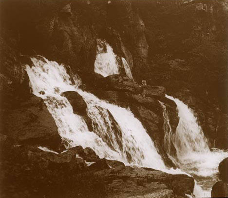 Fonts del Llobregat. Rafael Degollada i Castanys (Entre 1912 i 1924) This is a a photo of a natural area in Catalonia, Spain, with id: ES510202